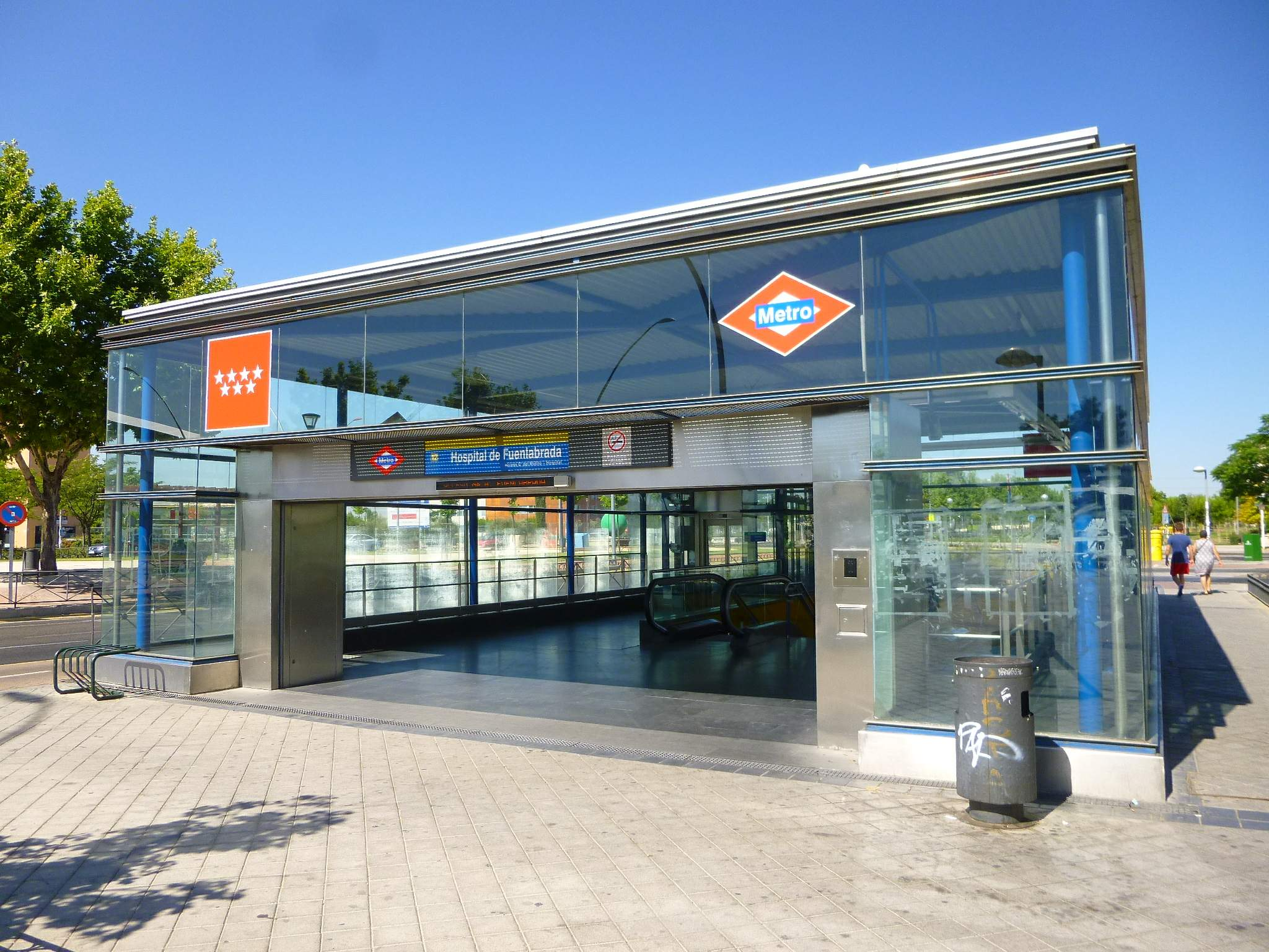 Fuenlabrada - Estación de Hospital de Fuenlabrada, de Madrid Metro